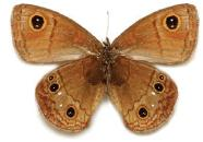 Calisto amazona